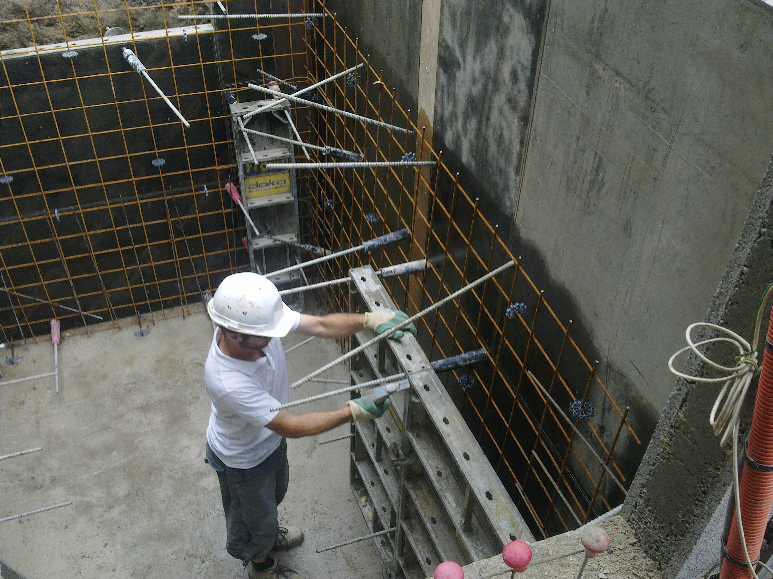 Pose de la 2ème face de banches (face intérieure)